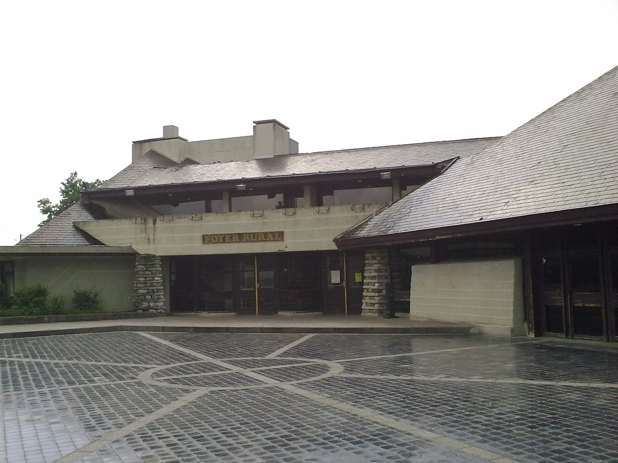 Ger (Pyrénées-Atlantiques), France